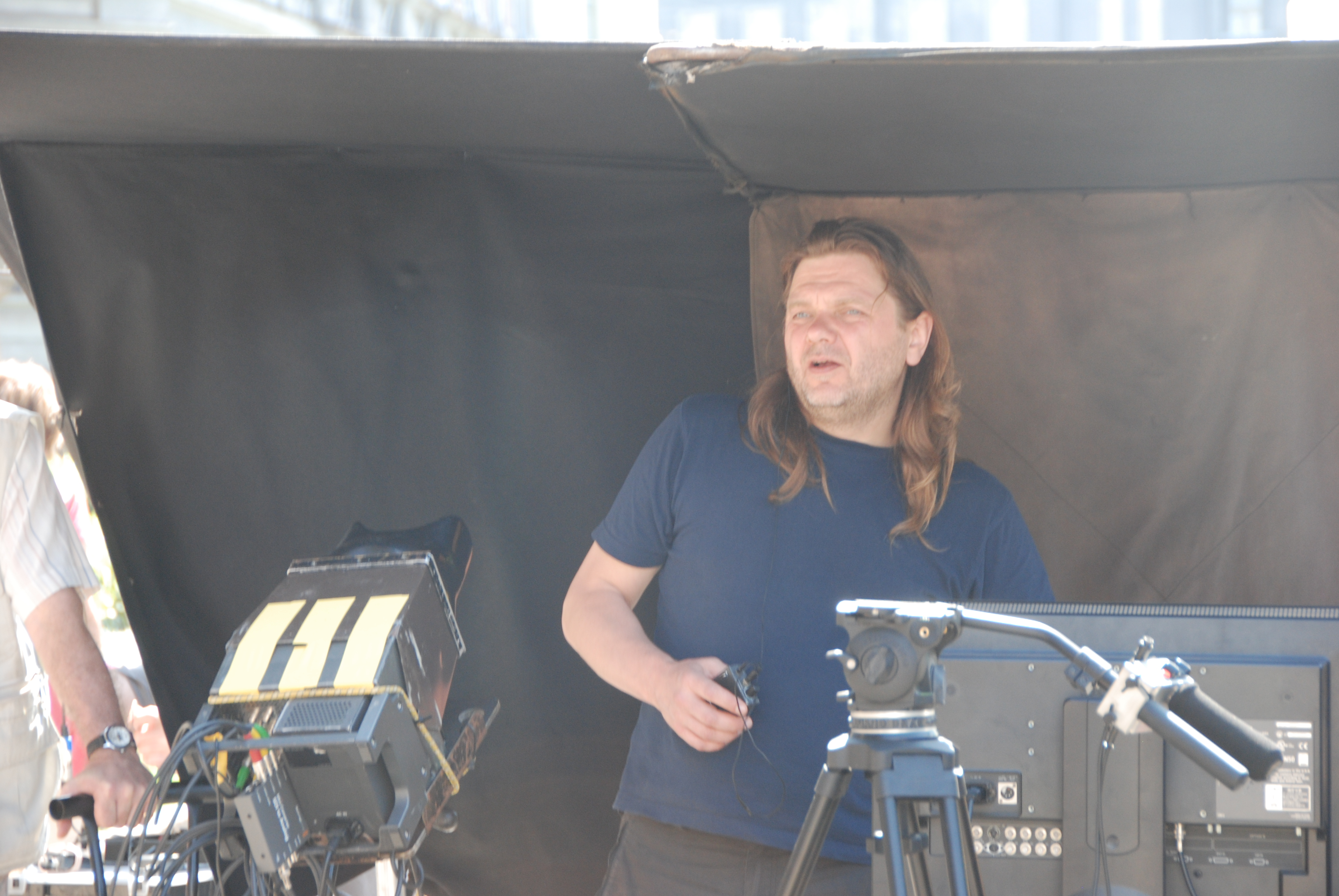 Filmas "Sapņu komanda 1935" epizodes filmēšana pie Ministru kabineta ēkas